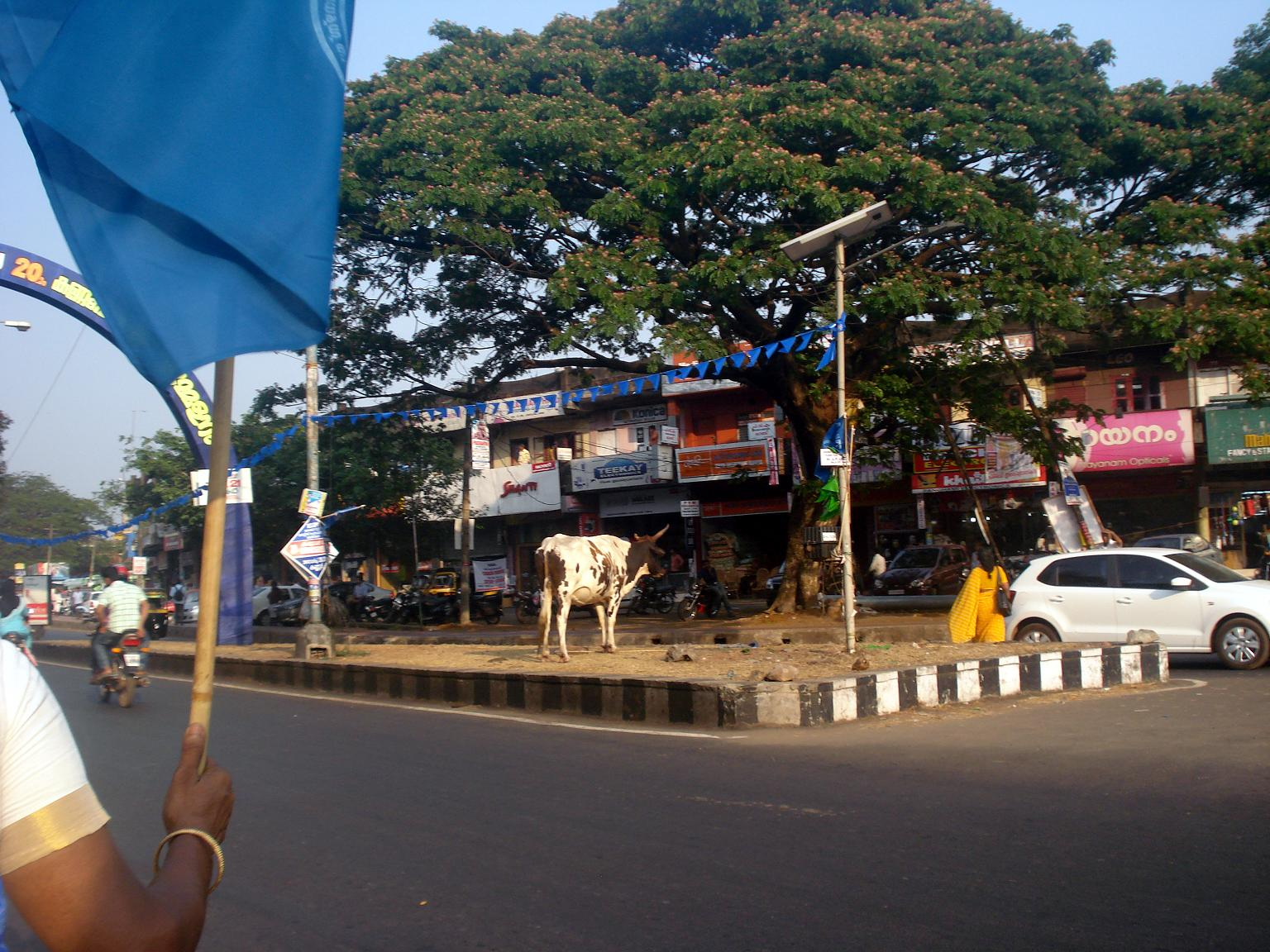 Yogasala Road Junction Kannur